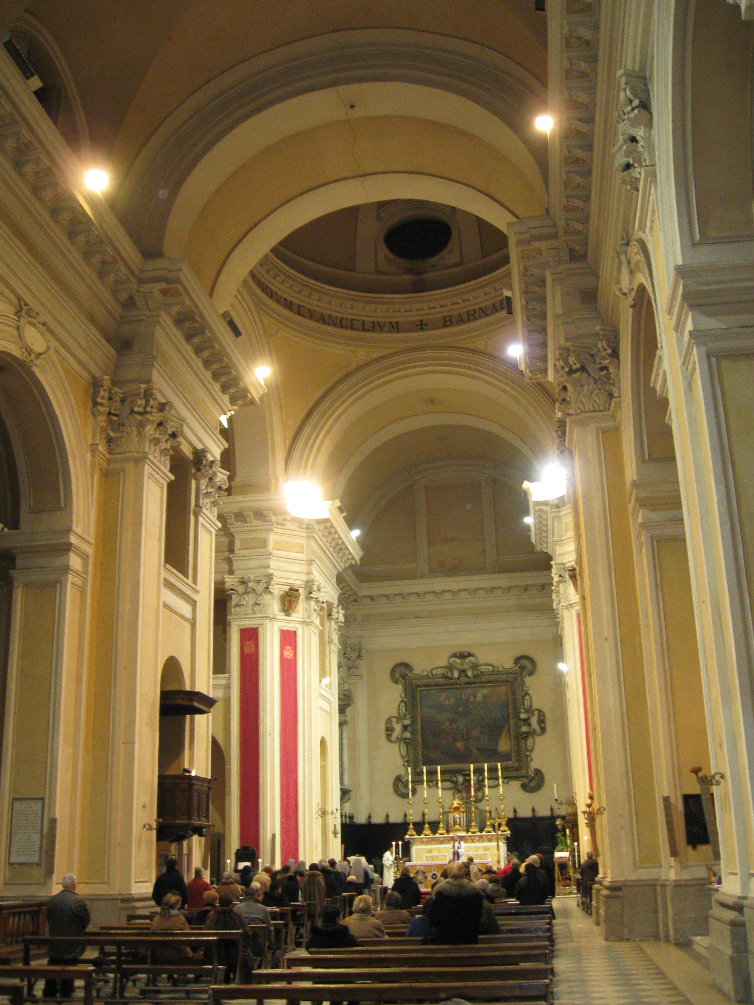 Interno basilica di San Barnaba a Marino (RM) (da sinistra)